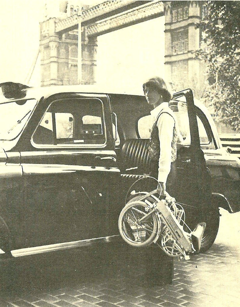 Le vélo pliant anglais Bickerton à Londres en 1971